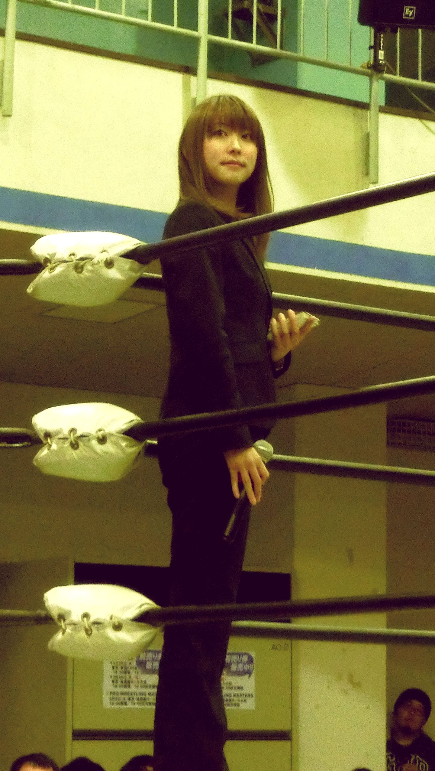 櫻田愛実20170114